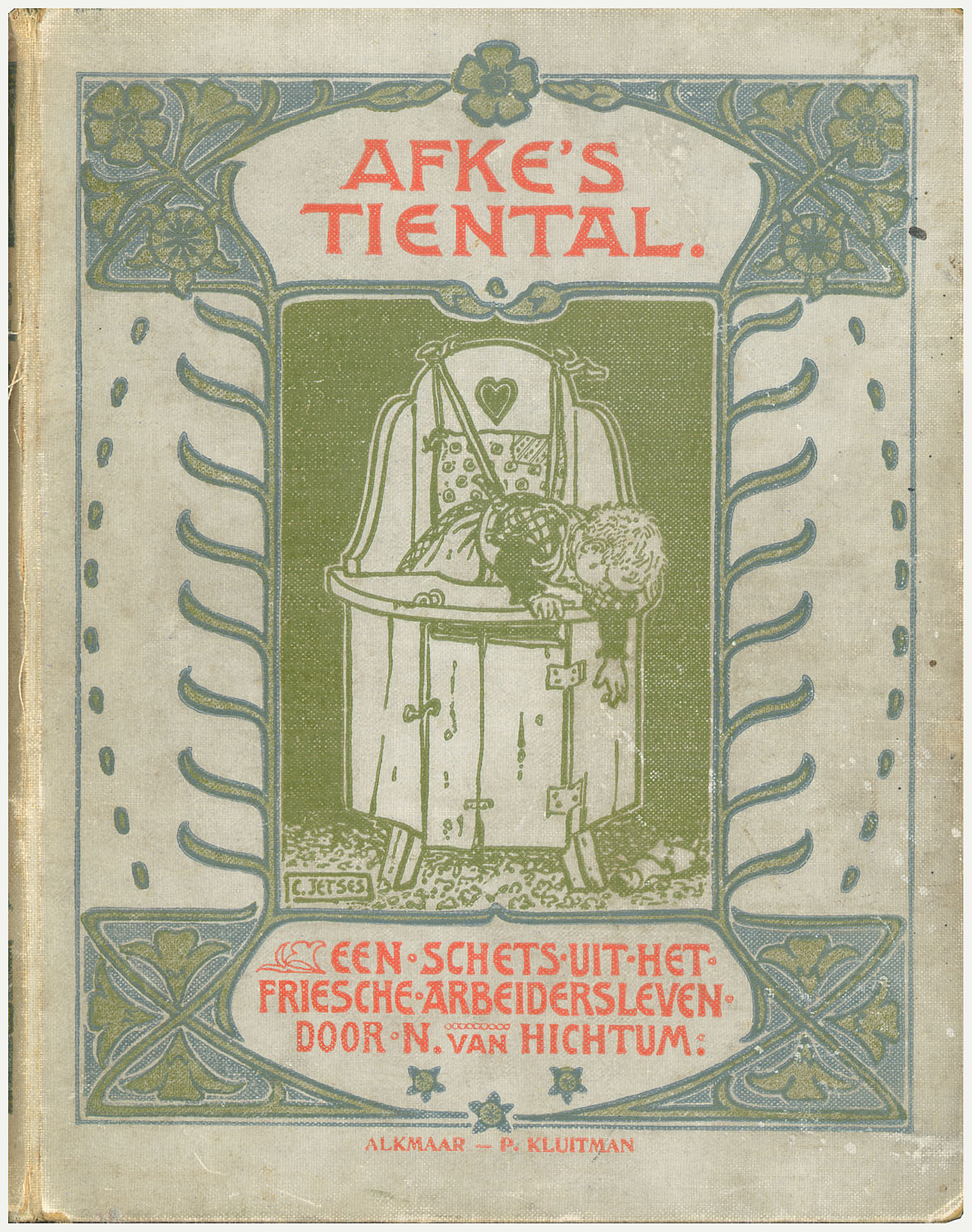 Boekomslag Afke's tiental: een schets uit het Friesche arbeidersleven van Nienke van Hichtum. Illustraties Cornelis Jetses. 2e druk 1907